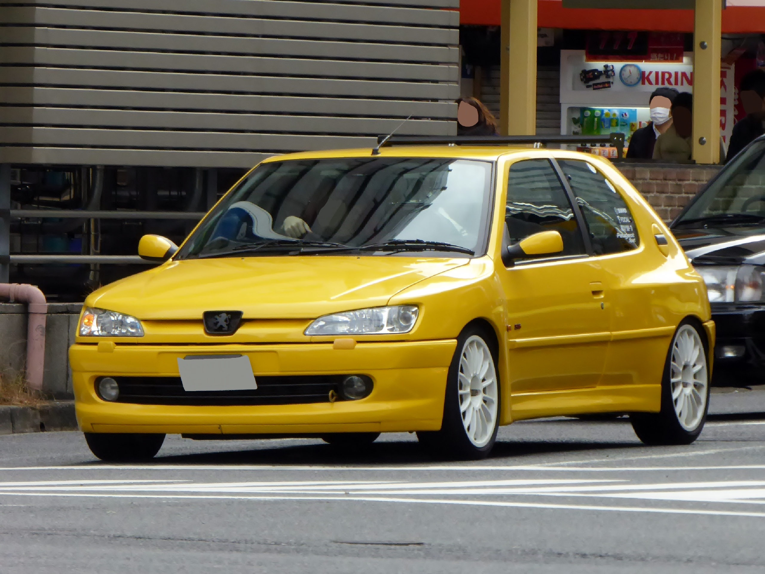 GF-N5S16型プジョー・306S16を撮影。